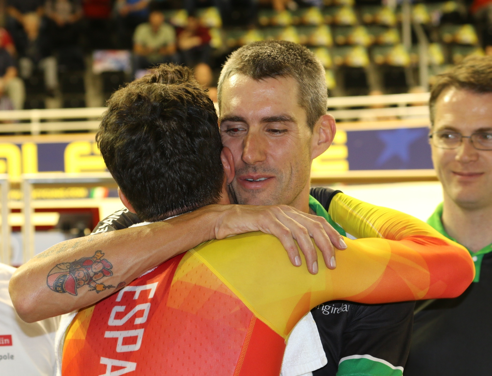 David Muntaner gratuliert Albert Torres zum EM-Titel im Omniu